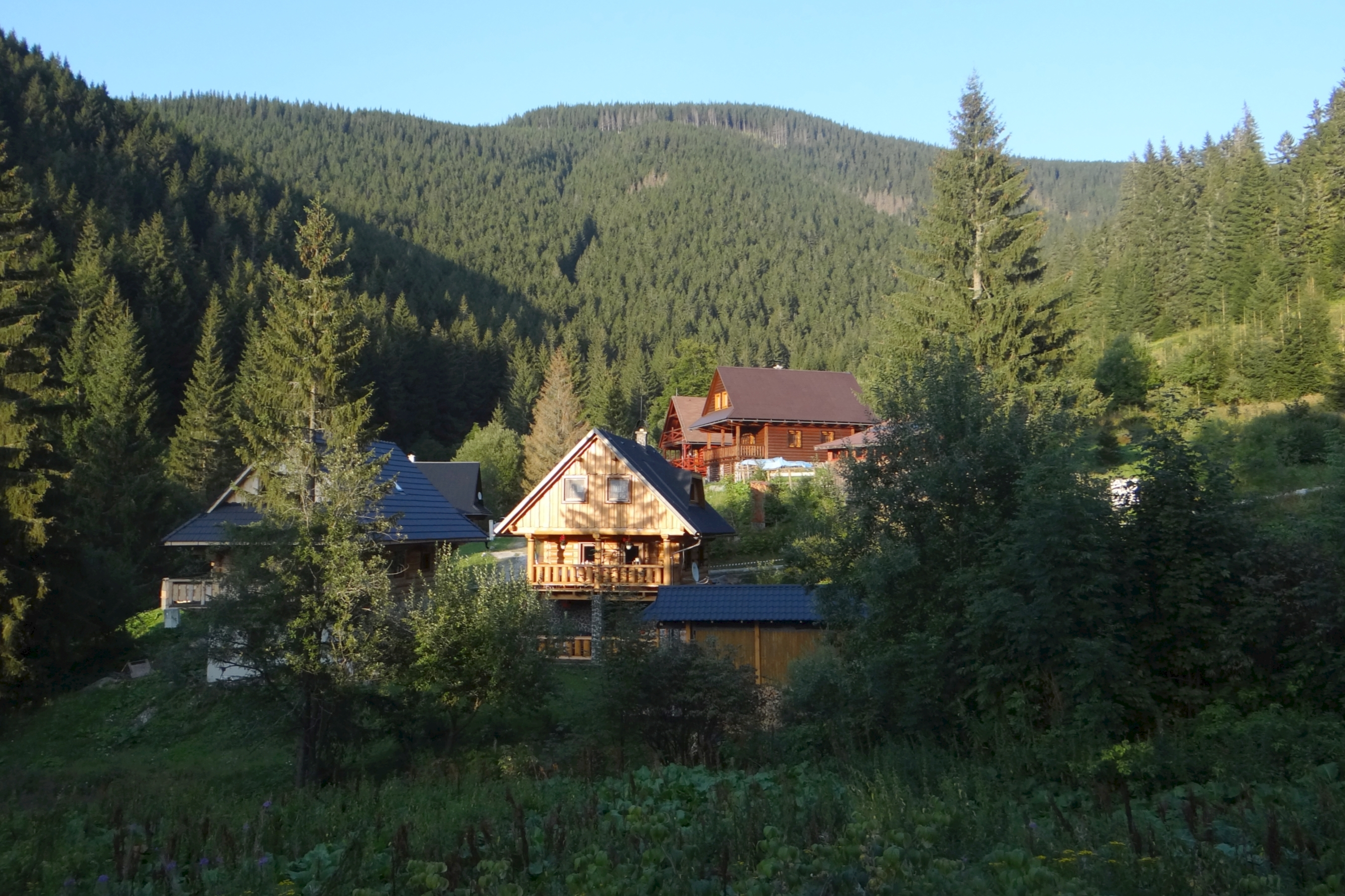 Osada Magurka w Niznych Tatrach (w Dolinie Lupczańskiej)